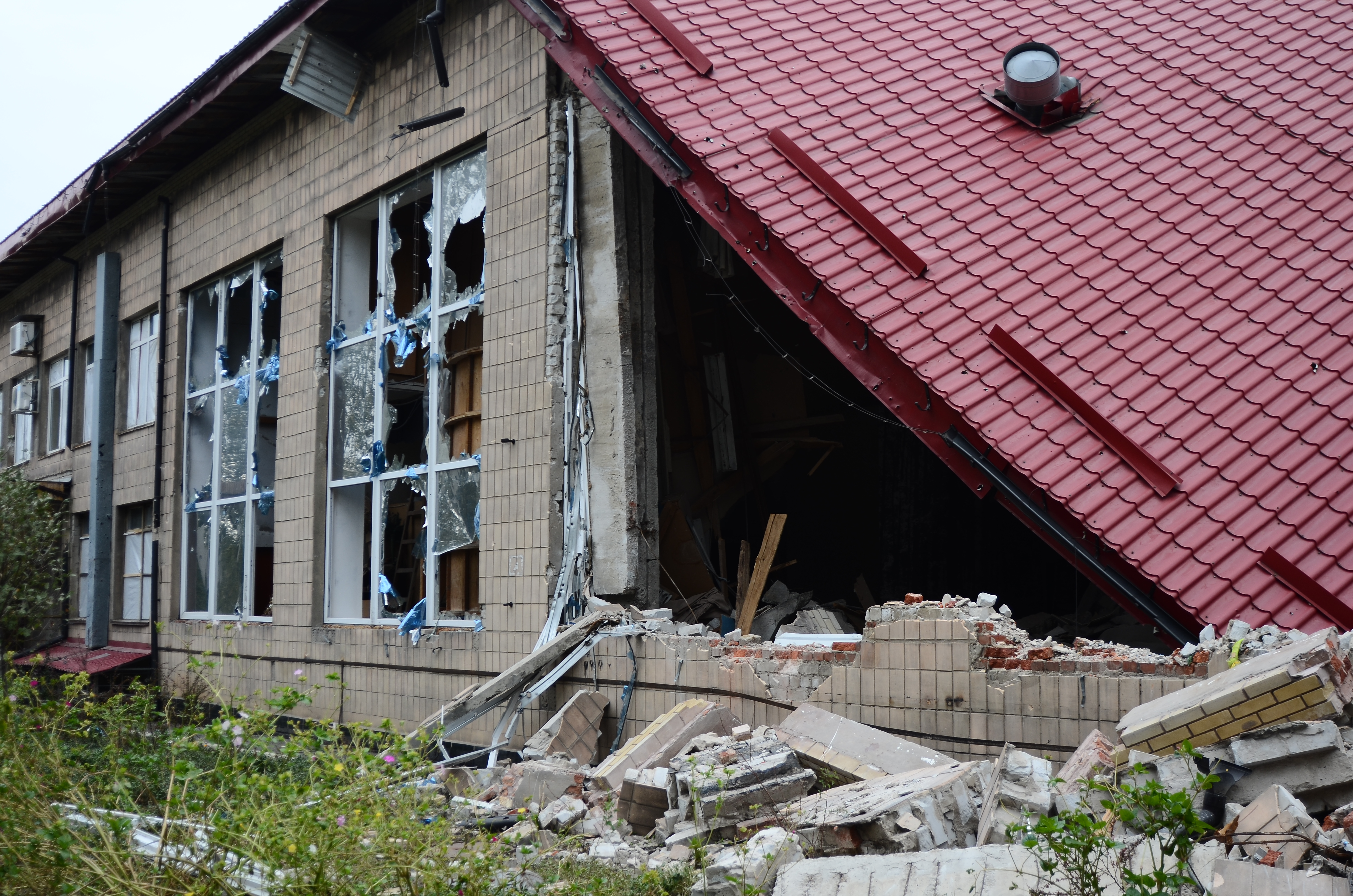 Донецкий краеведческий музей. Последствия обстрелов украинской армией.